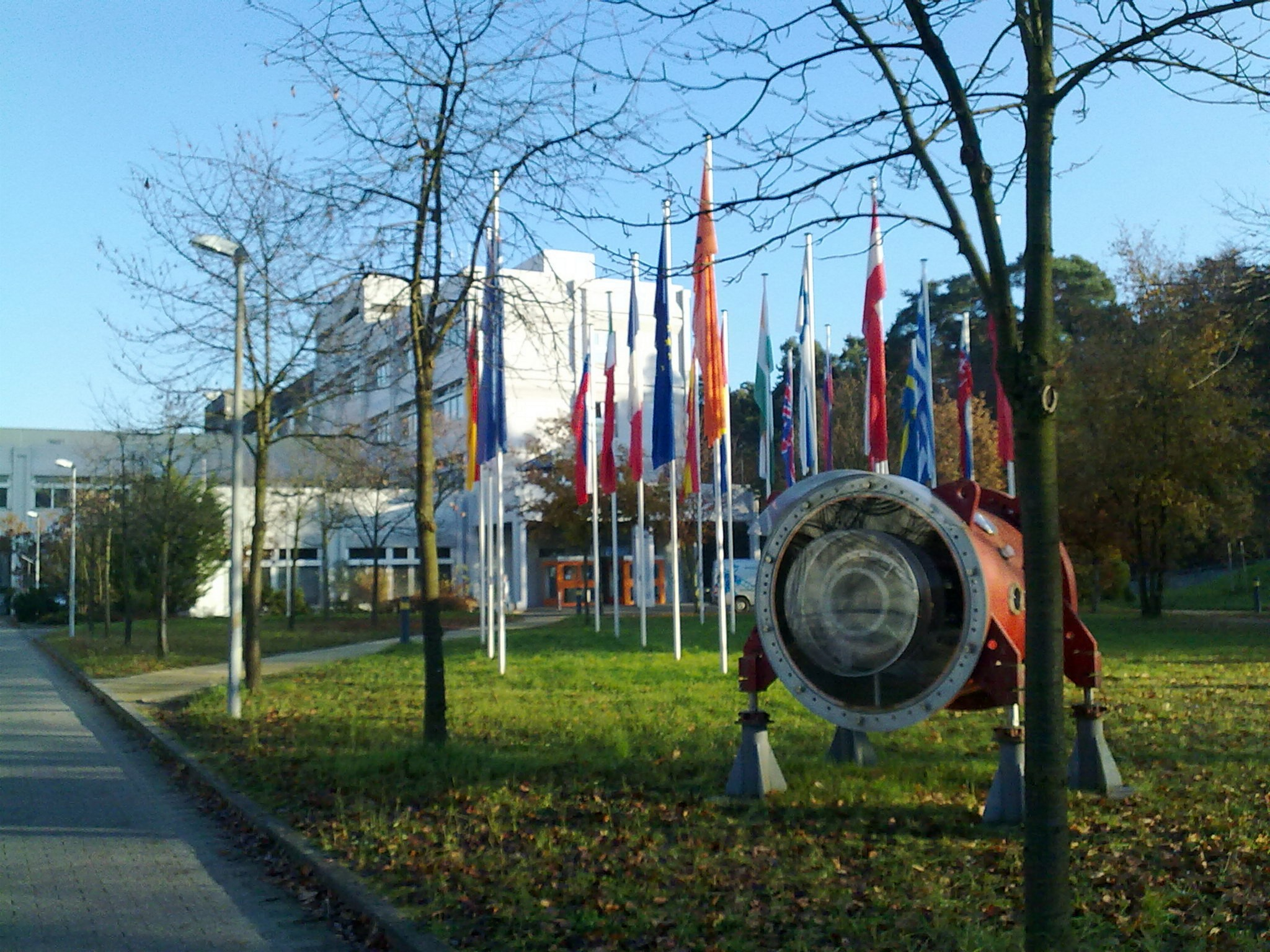 Blick auf den Südbau der GSI